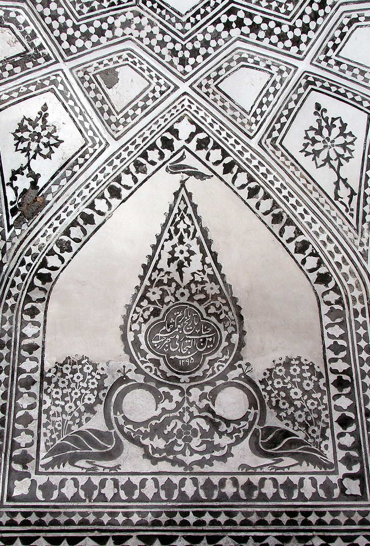 حمام خان سنندج